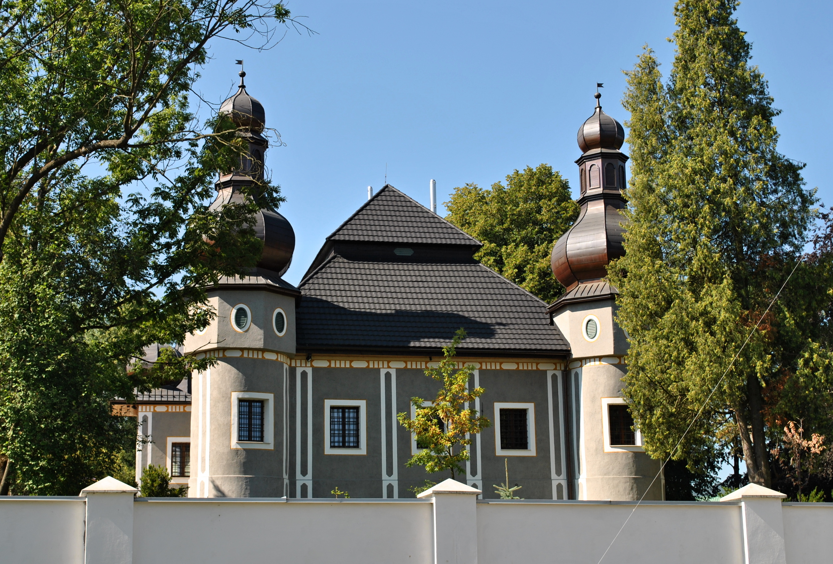 Kúria